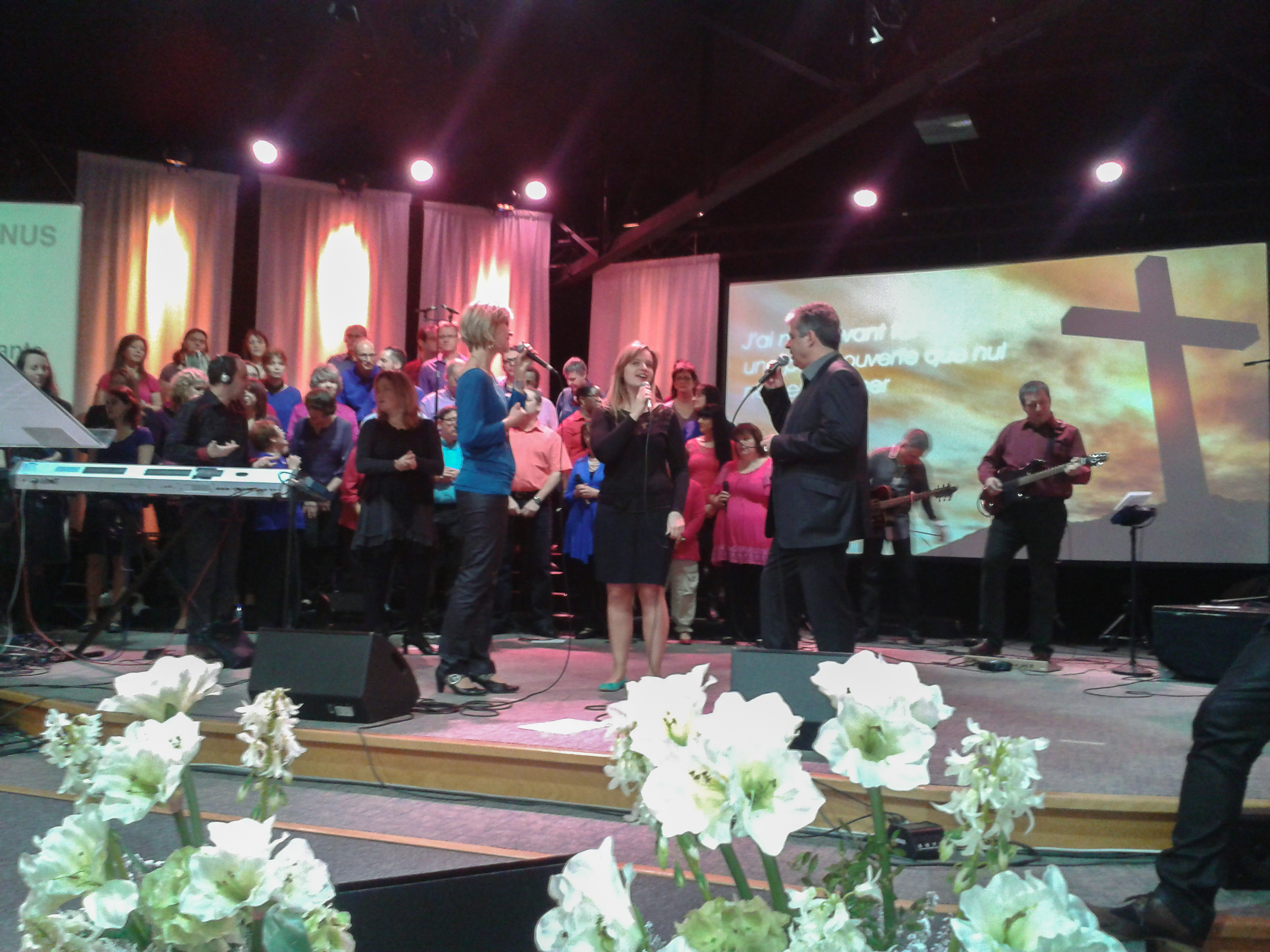 Photographie du chœur et de la chorale de l'église de la Porte Ouverte Chrétienne à Mulhouse (France).